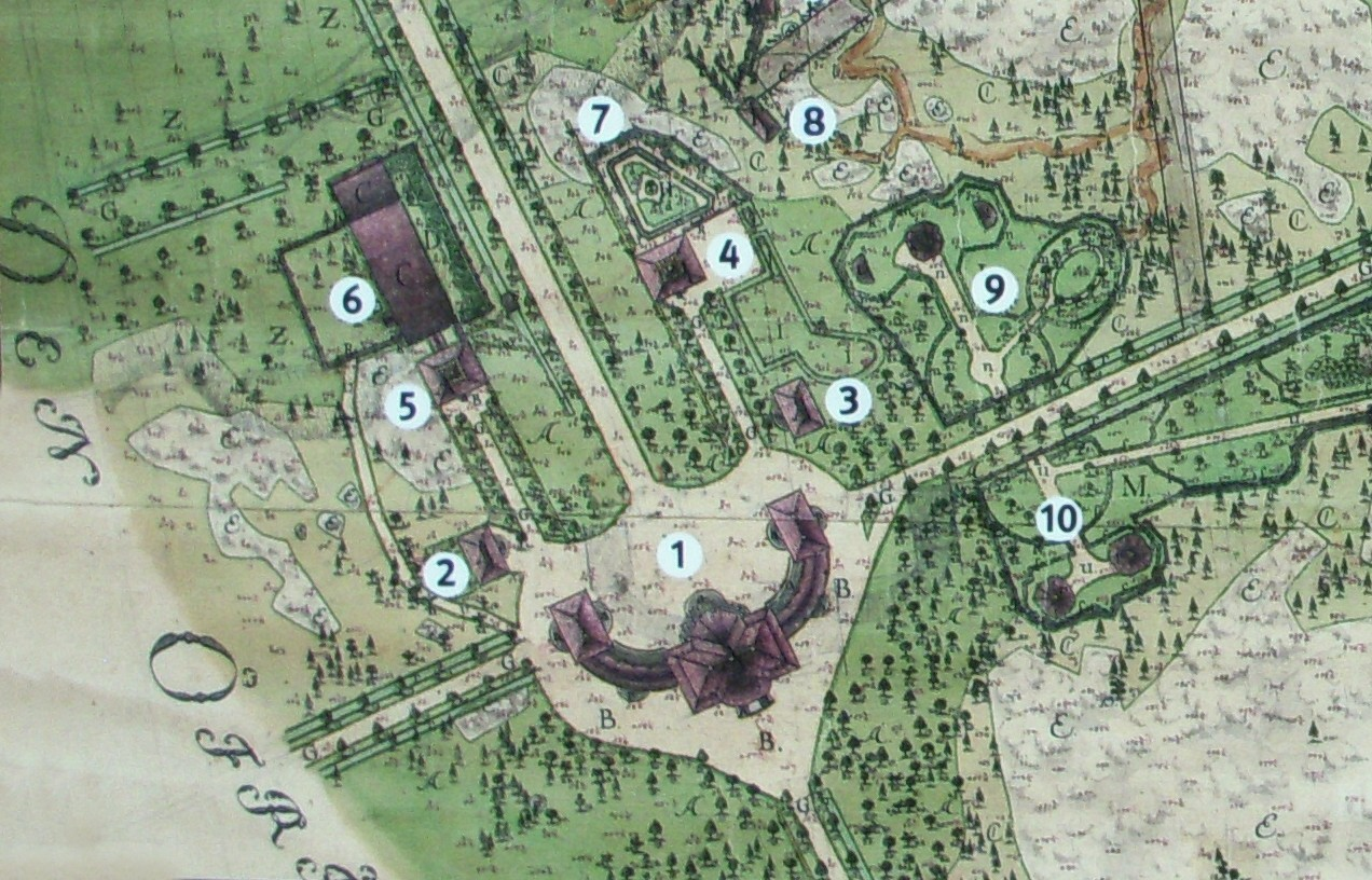 Området kring Kina slott 1779. 1= Kina slott, huvudbyggnad 2= Västra flygeln (Silverkammaren) 3= Östra flygeln (Biljarden) 4= Adolf Fredriks verkstad 5= Confidensen 6= Köket 7= Trädgården 8= Boningshus (rivet) 9, 10= Voliere (fågelhus) och lövsalar